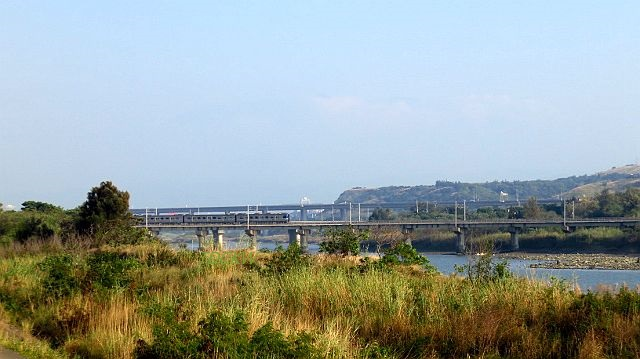 台鐵海線下後龍溪橋 was filmed by TDCKW on 20181202